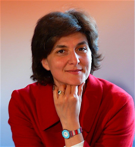 Sylvie Goulard, lors de la Convention thématique européenne du Mouvement Démocrate à Bouin, (Vendée) - 15 avril 2009